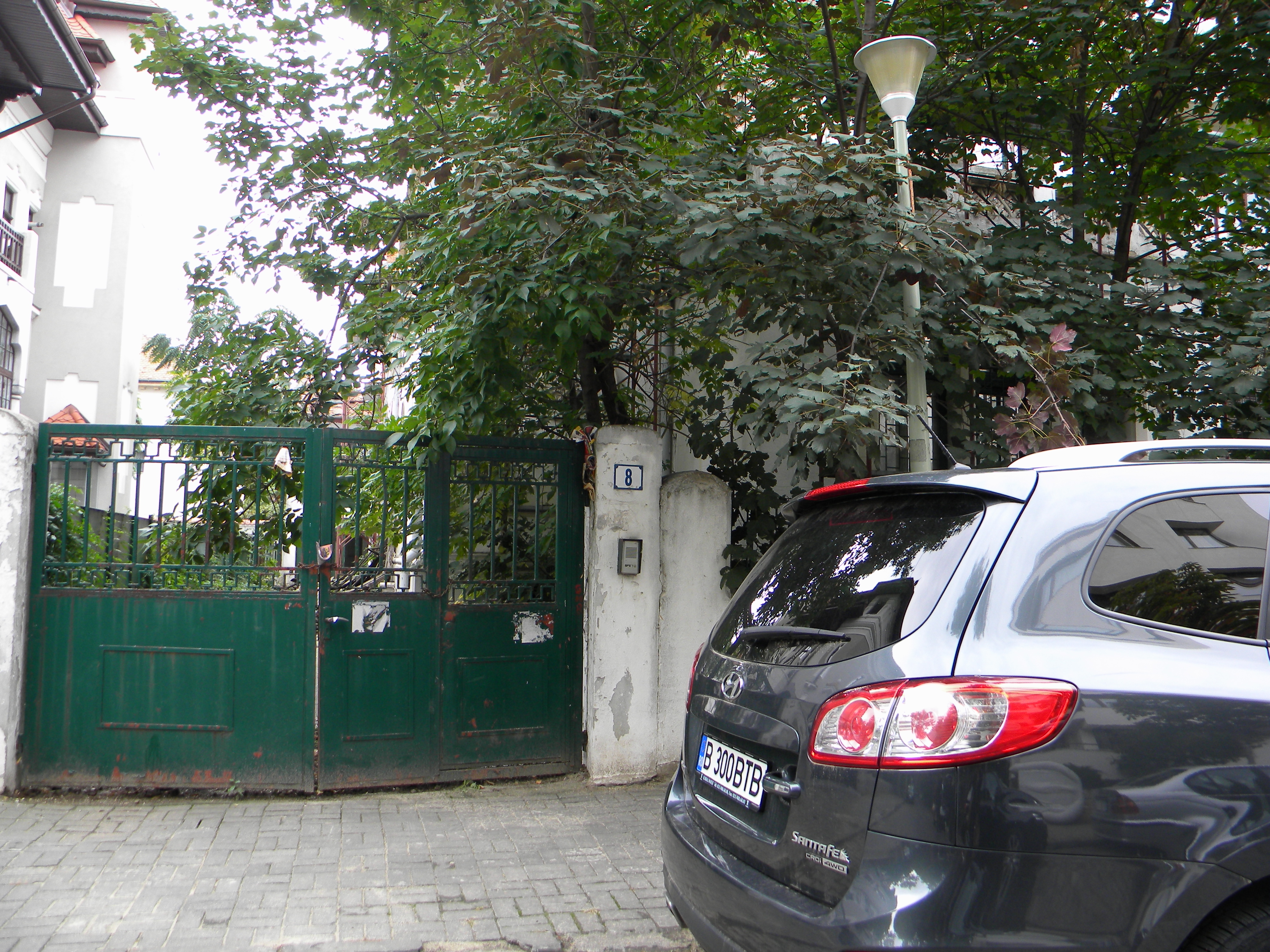 Bucuresti, Romania, Str. Belgrad nr. 8 (Casa); B-II-m-B-18122 (detaliu 1)